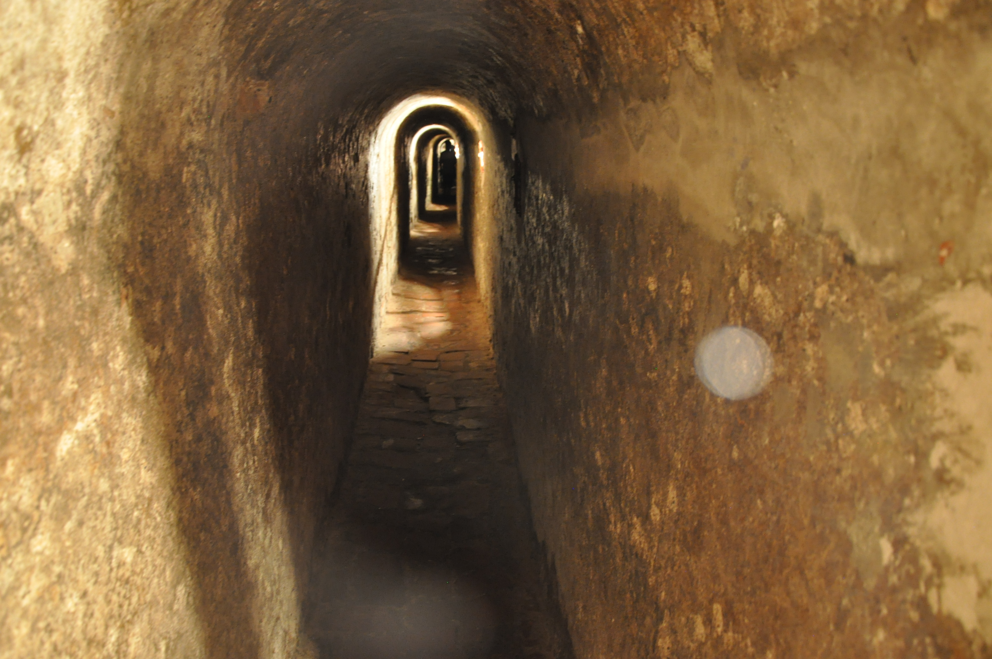 túneles del castillo cartagena